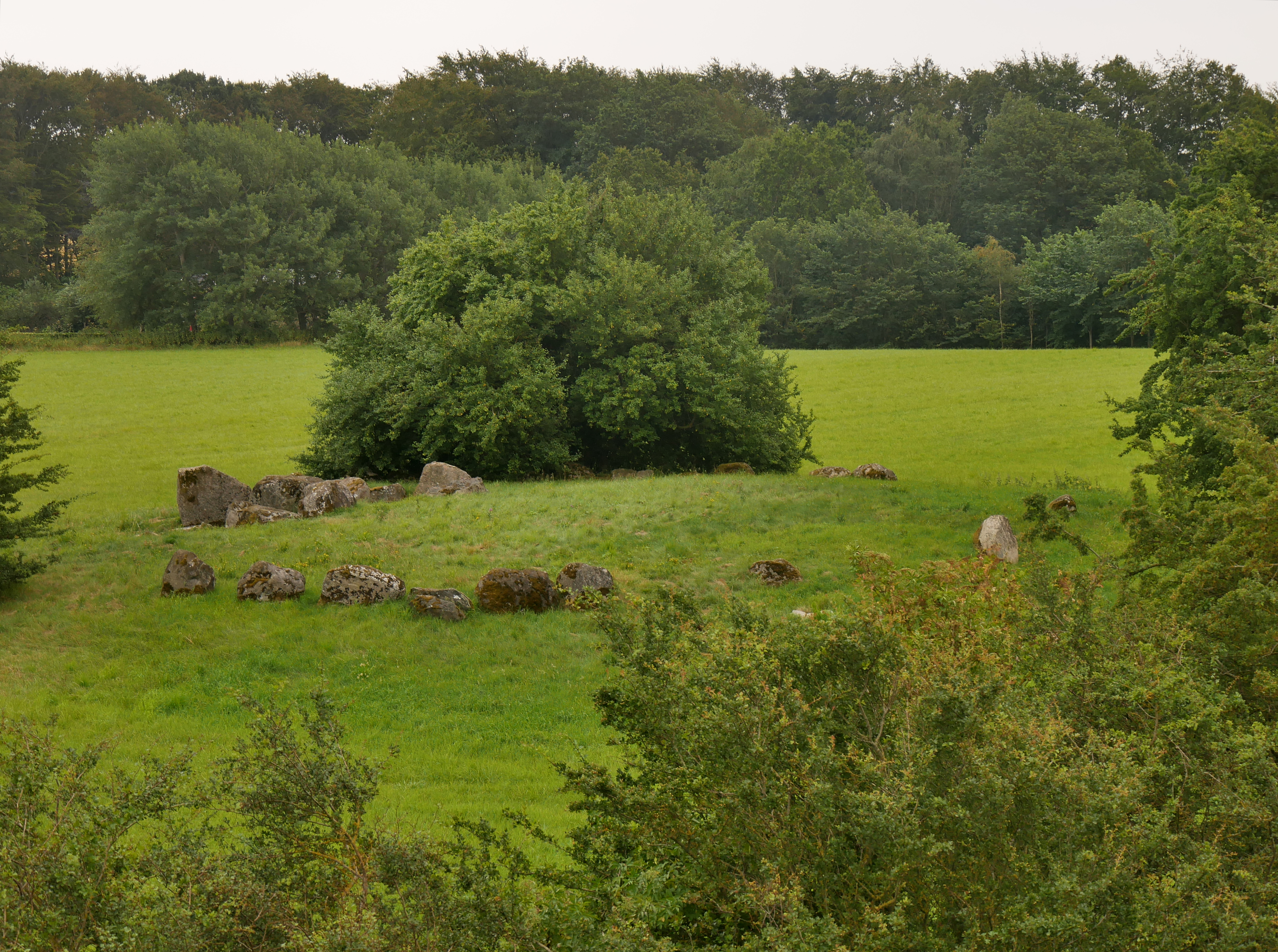 Ganggräber von Snæbum Randsteine der Anlage Hannerup Jættestue vom Gipfel des Doppelganggrabs Snibhøj